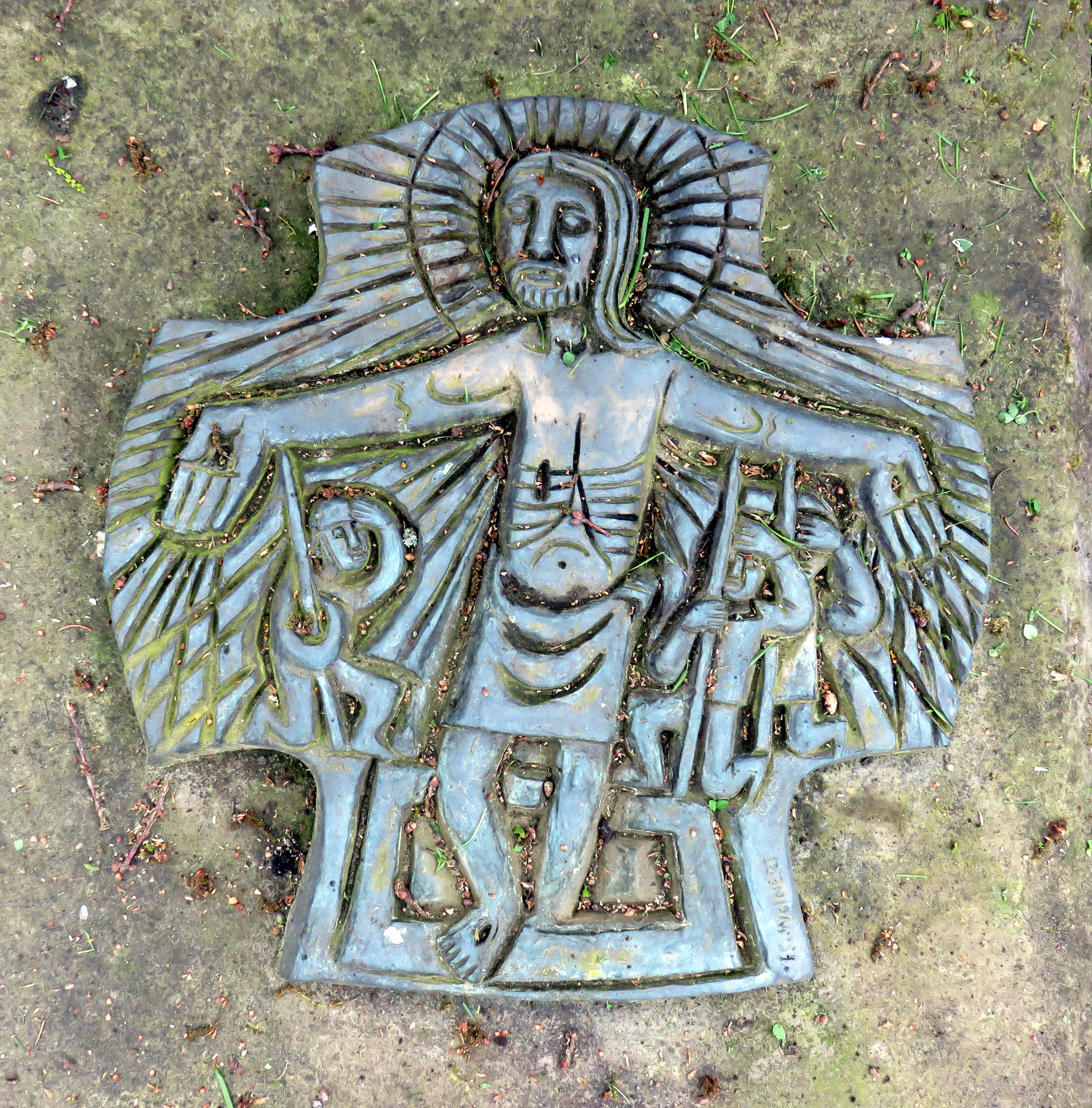 Bereich mit Grabplatten leitender Hamburger Geistlicher sowie die vier letzten Stationen des Kreuzweges, Friedhof Ohlsdorf, Planquadrat Bm 70 (südlich Kapelle 13), zentrale Stele mit Kruzifix von 1886 des ehemaligen Hamburger Friedhofs Karolinenstraße. Auf der Grabplatte Joachim von Stockhausen befindet sich ein Relief von Egino Weinert.